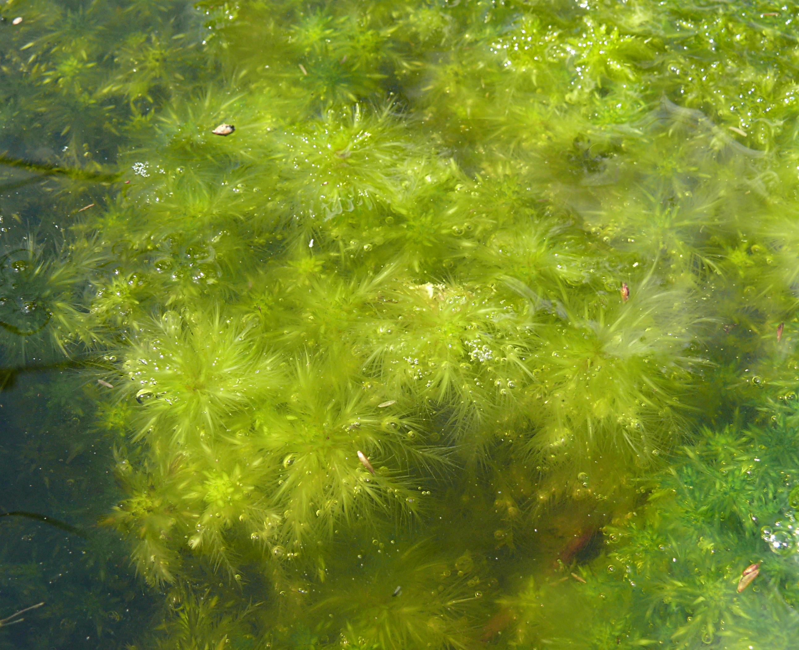 Sphagnum cuspidatum, submers, Nordschwarzwald, Deutschland